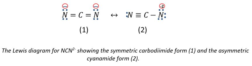 carbodiimide-cynamide